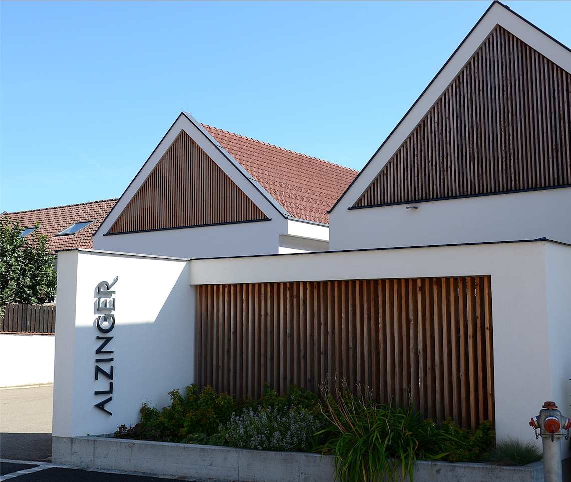 Weinut Alzinger, 2019